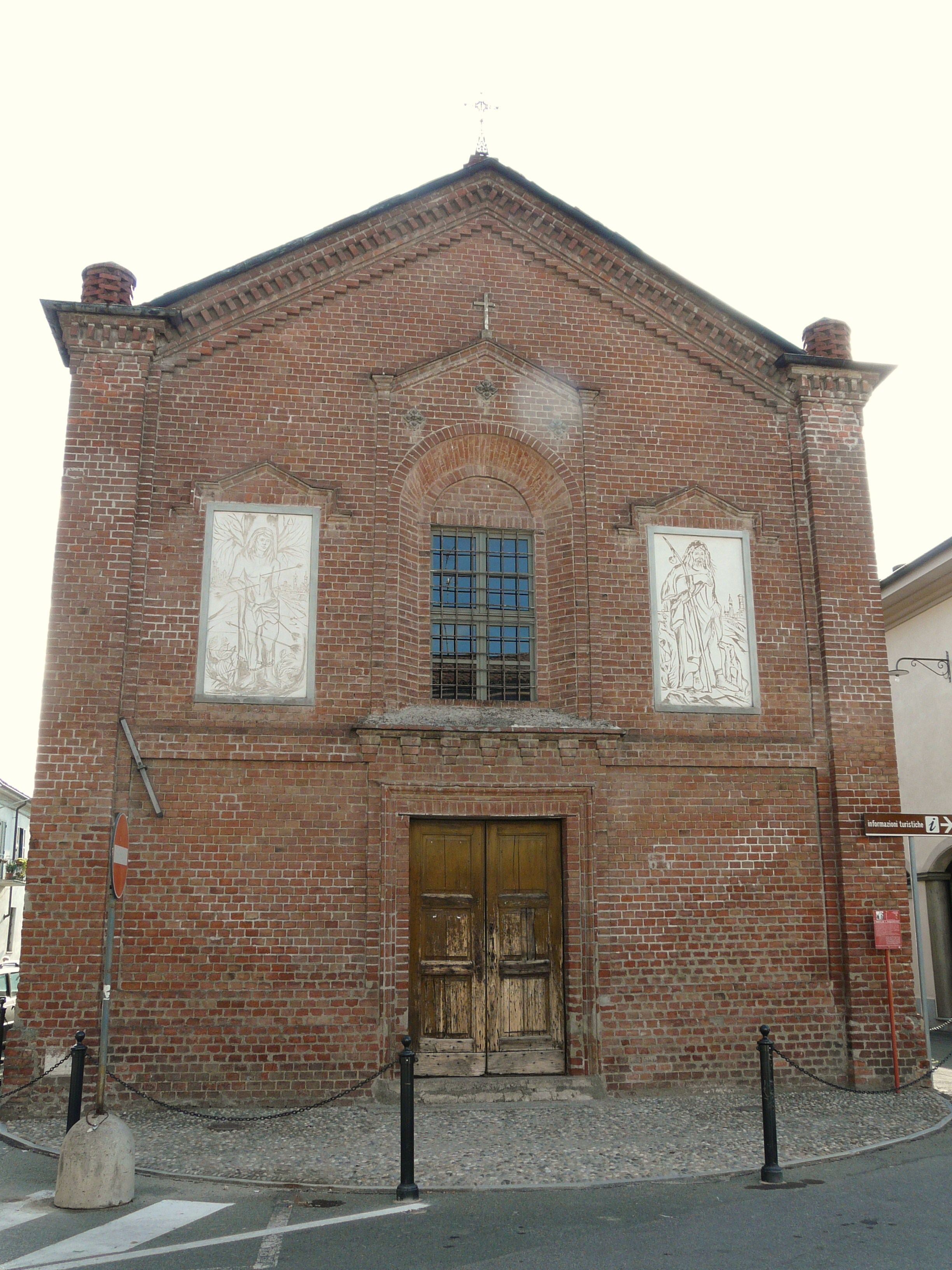 Chiesa di San Sebastiano, Castellazzo Bormida, Piemonte, Italia